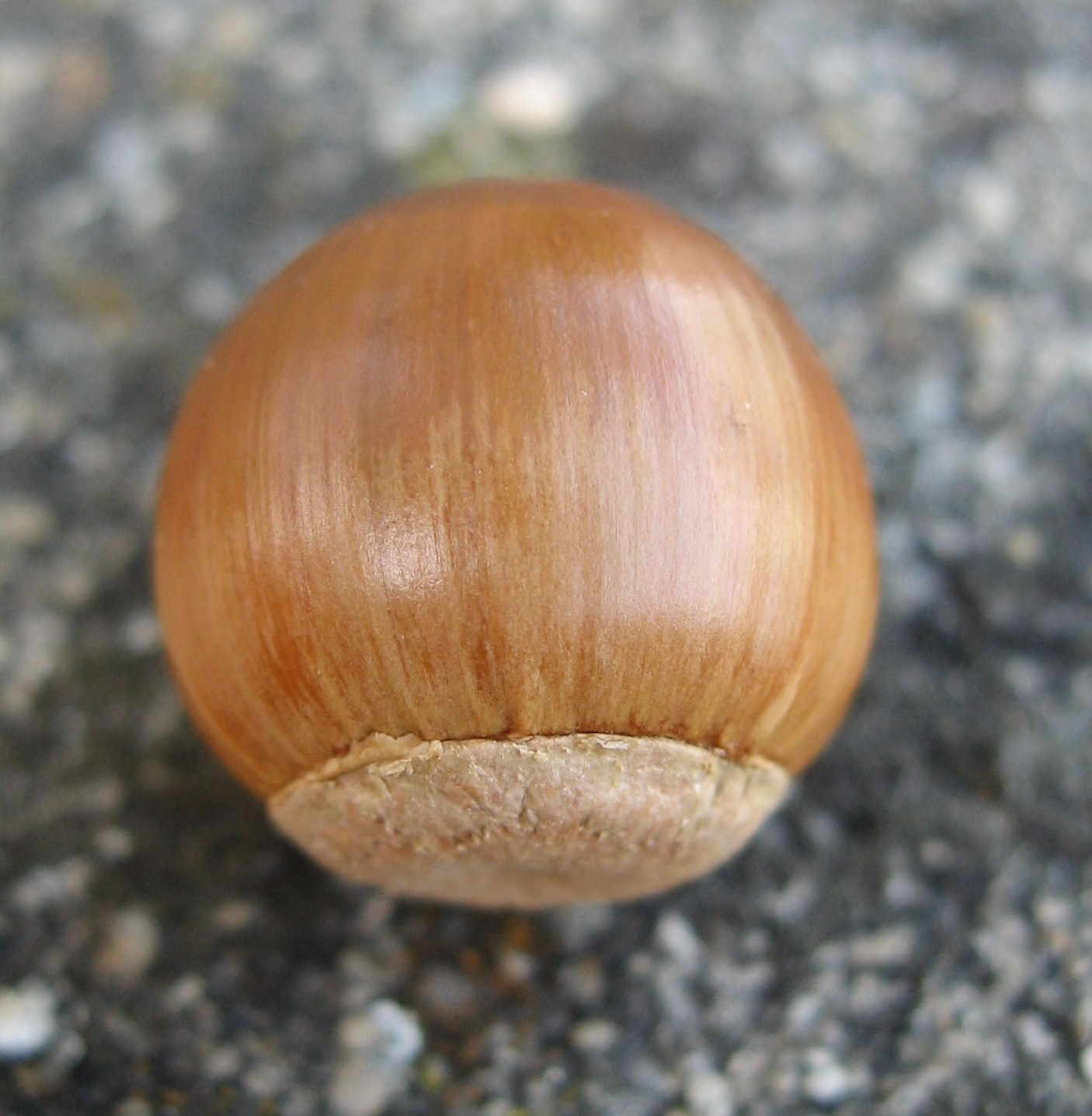 Quercus acutissima in Serres d'Auteuil Map: 48° 50' 49" N 2° 15' 8" E